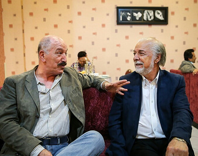 چنگیز جلیلوند (راست) - سعید راد (چپ)